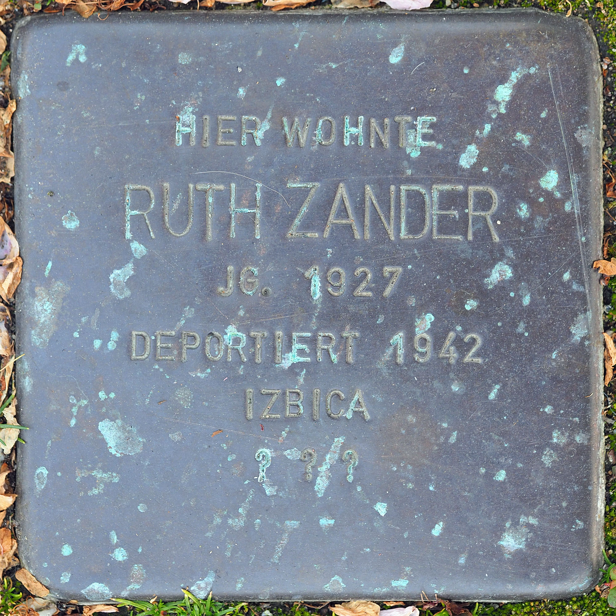 Stolpersteine MG: Zander, Ruth